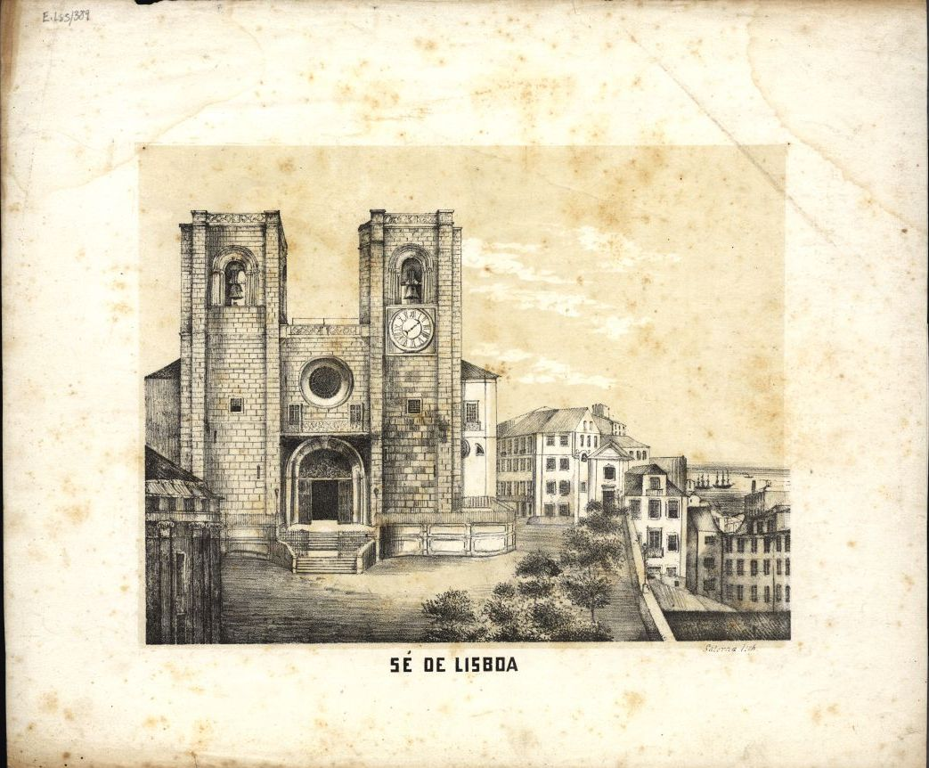 Sé de Lisboa no XIX seculo